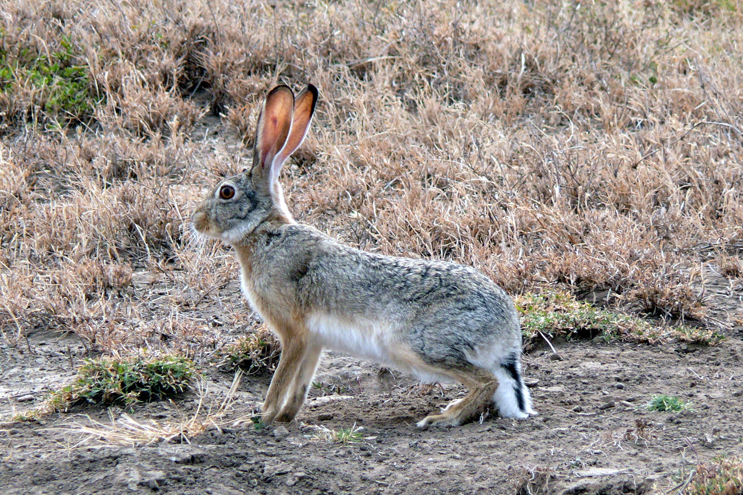 Kaphase (Lepus capensis), Nord-Tansania